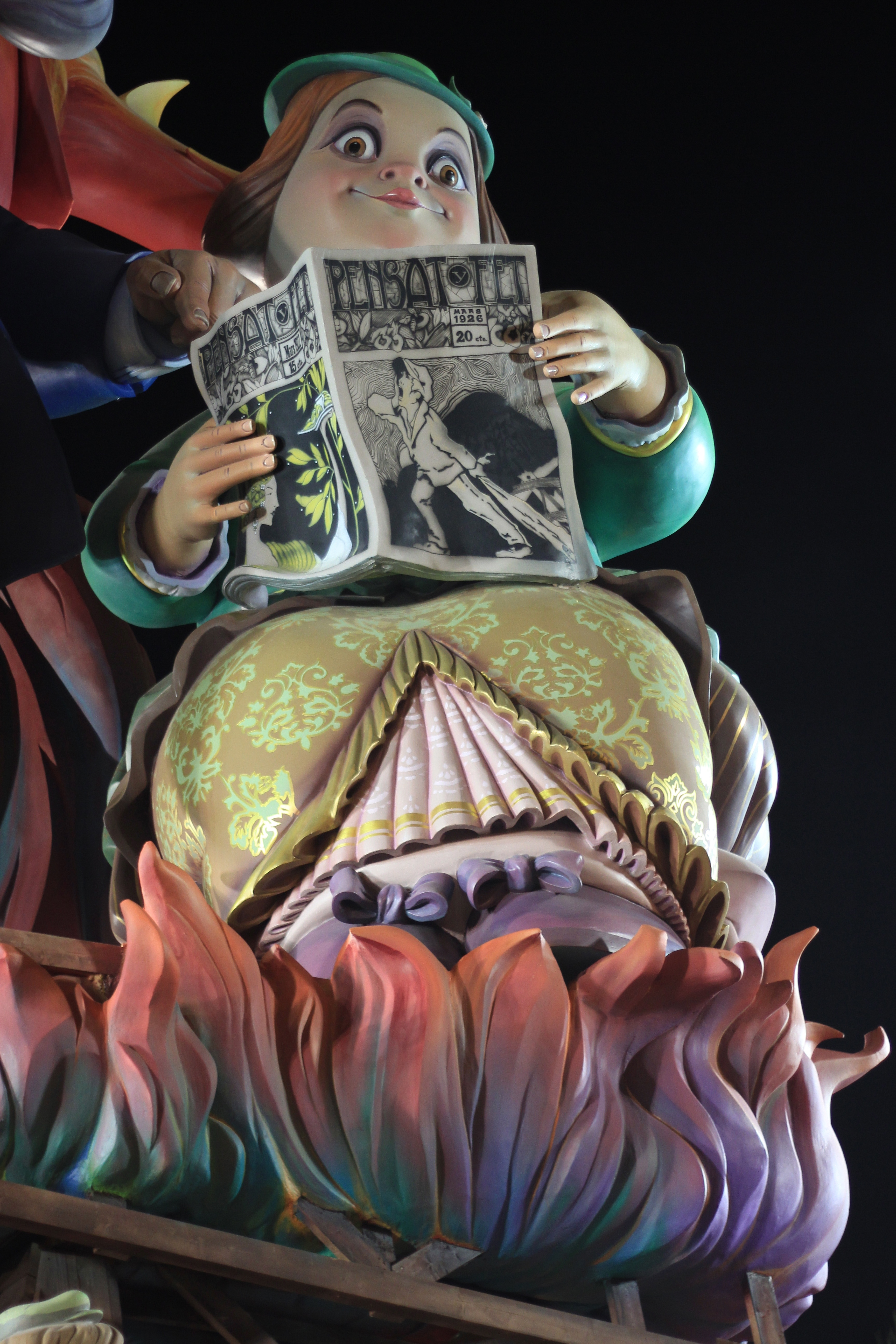 Detall de la figura central on dona llig la revista "Pensat i Fet".